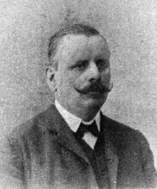 Österreichischer Politiker, Reichsratswahl 1907, Name siehe Dateiname